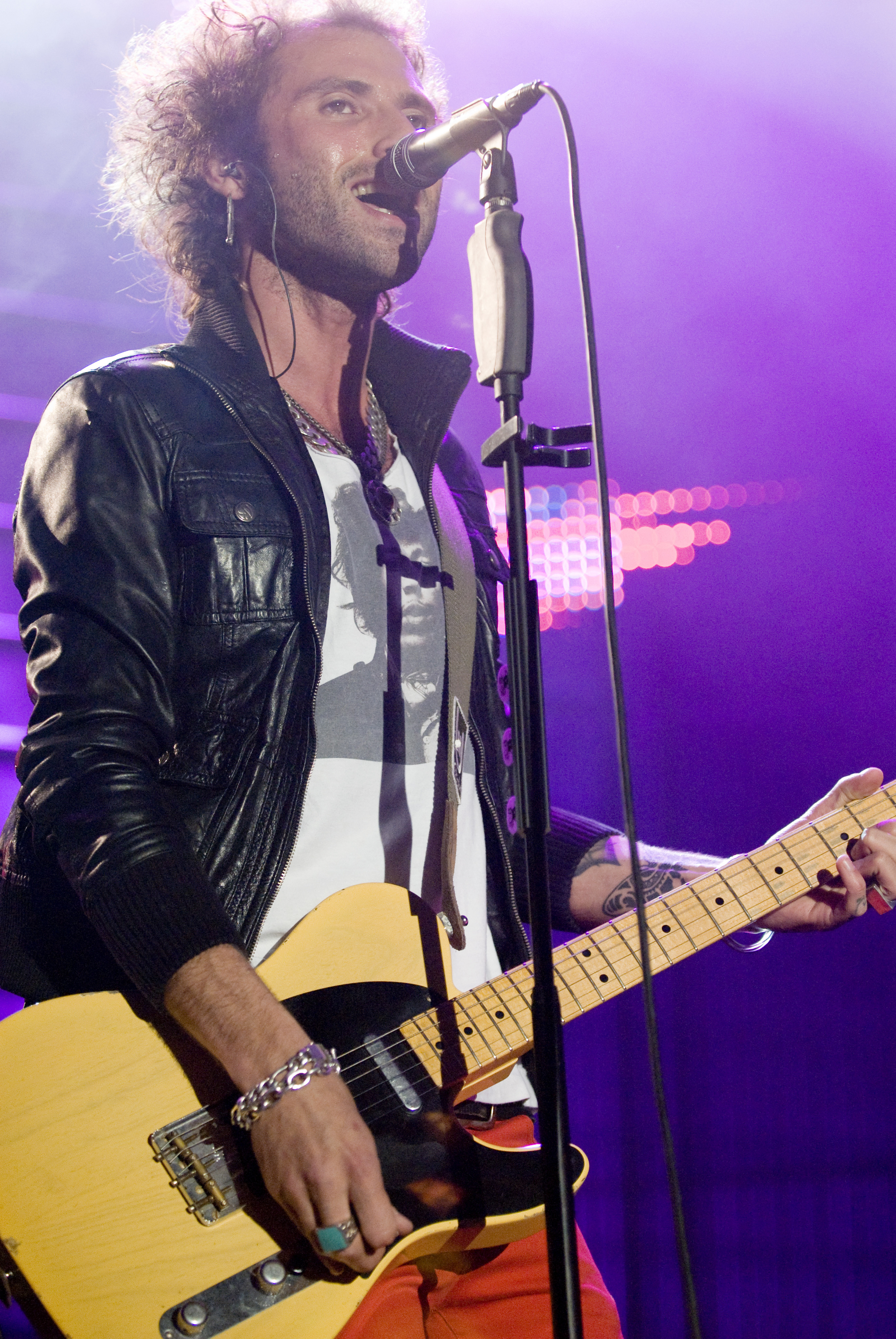 Pereza